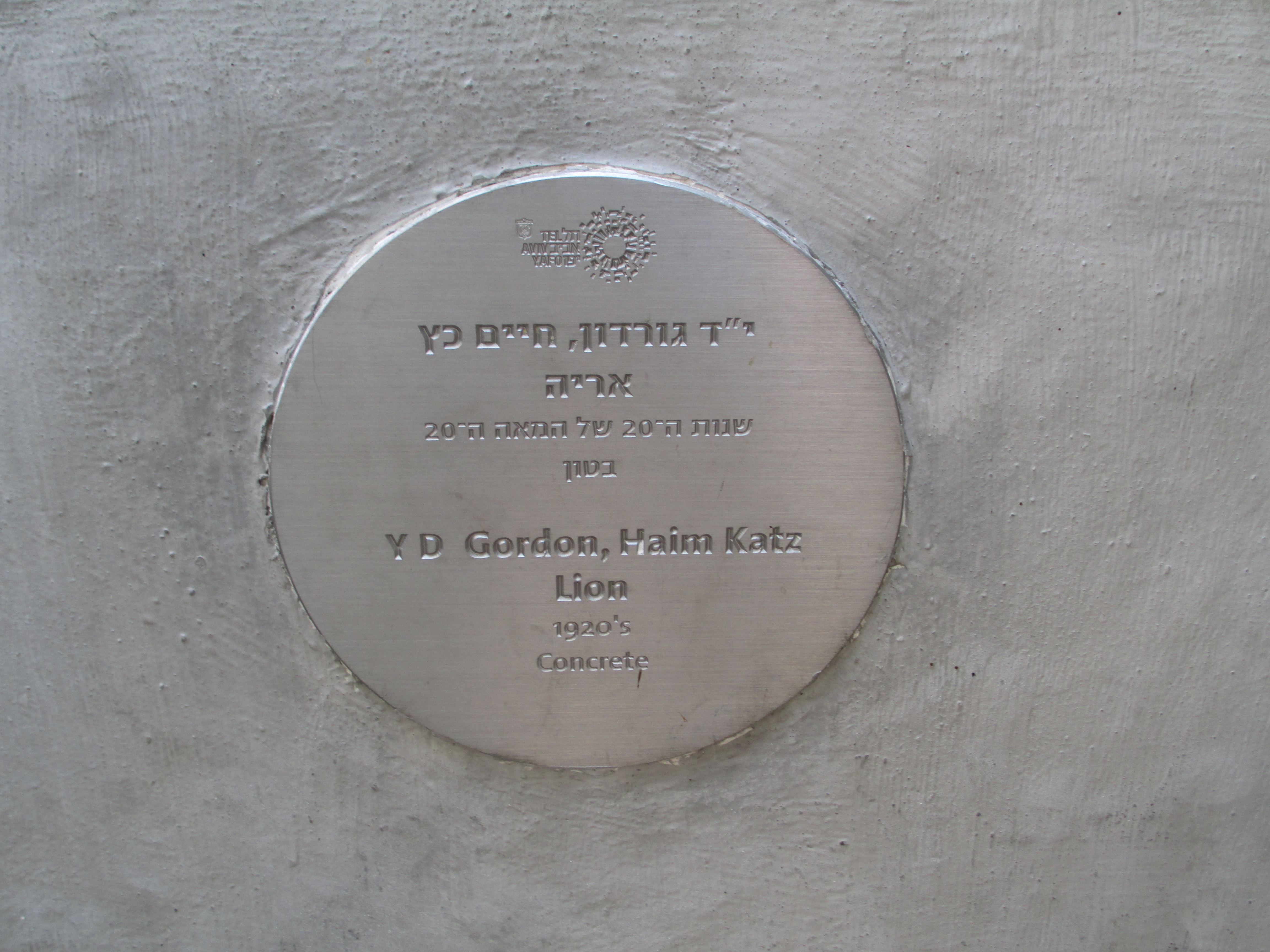 לוחית זיכרון על פסל האריה בסמטה פלונית